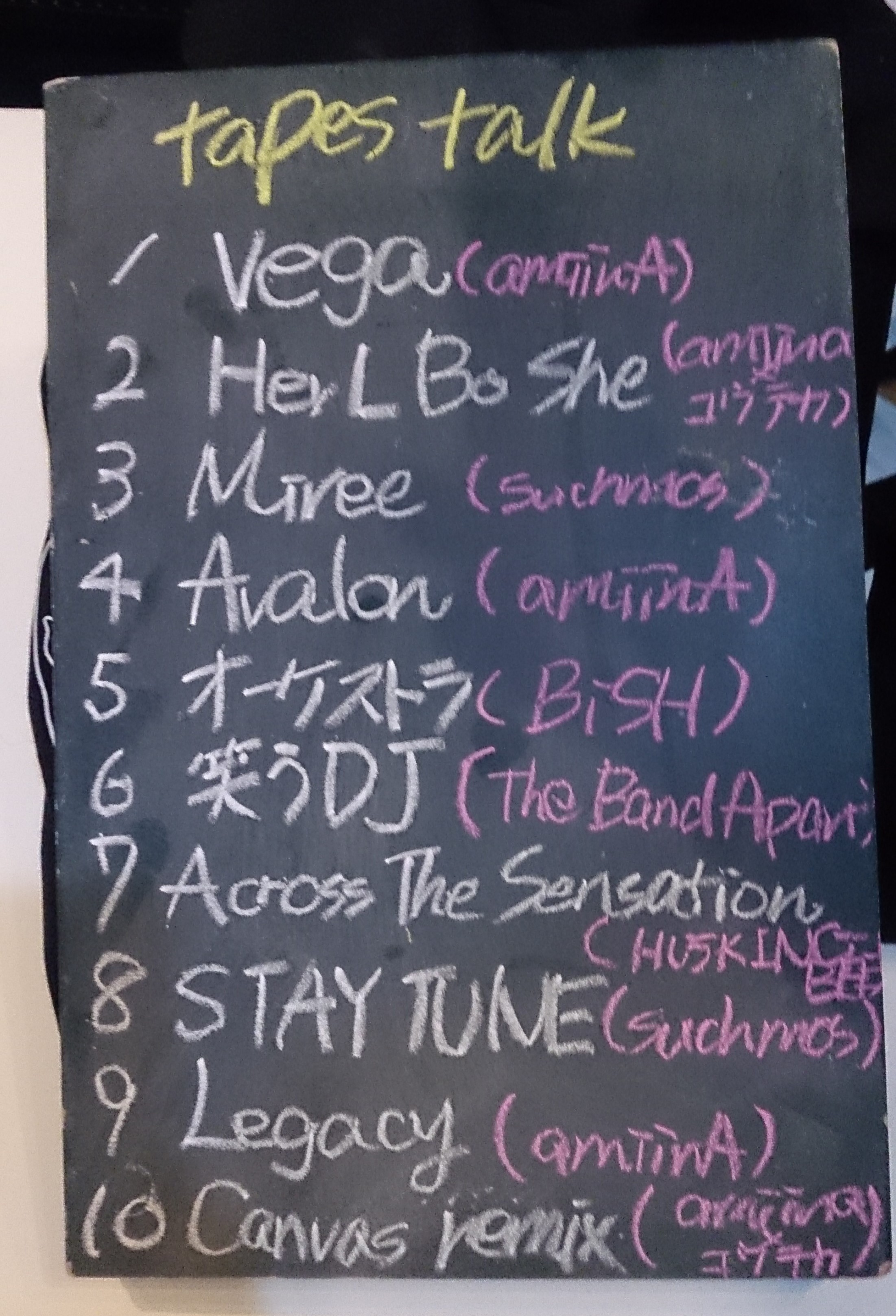 amiinAセトリボード(20170902(1))